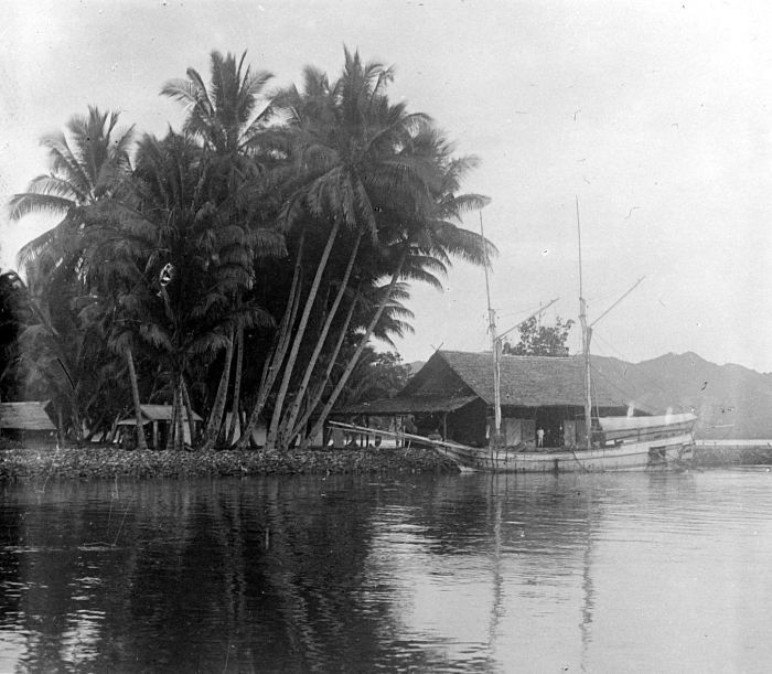 Repronegatief. Landingspier te Mamoedjoe